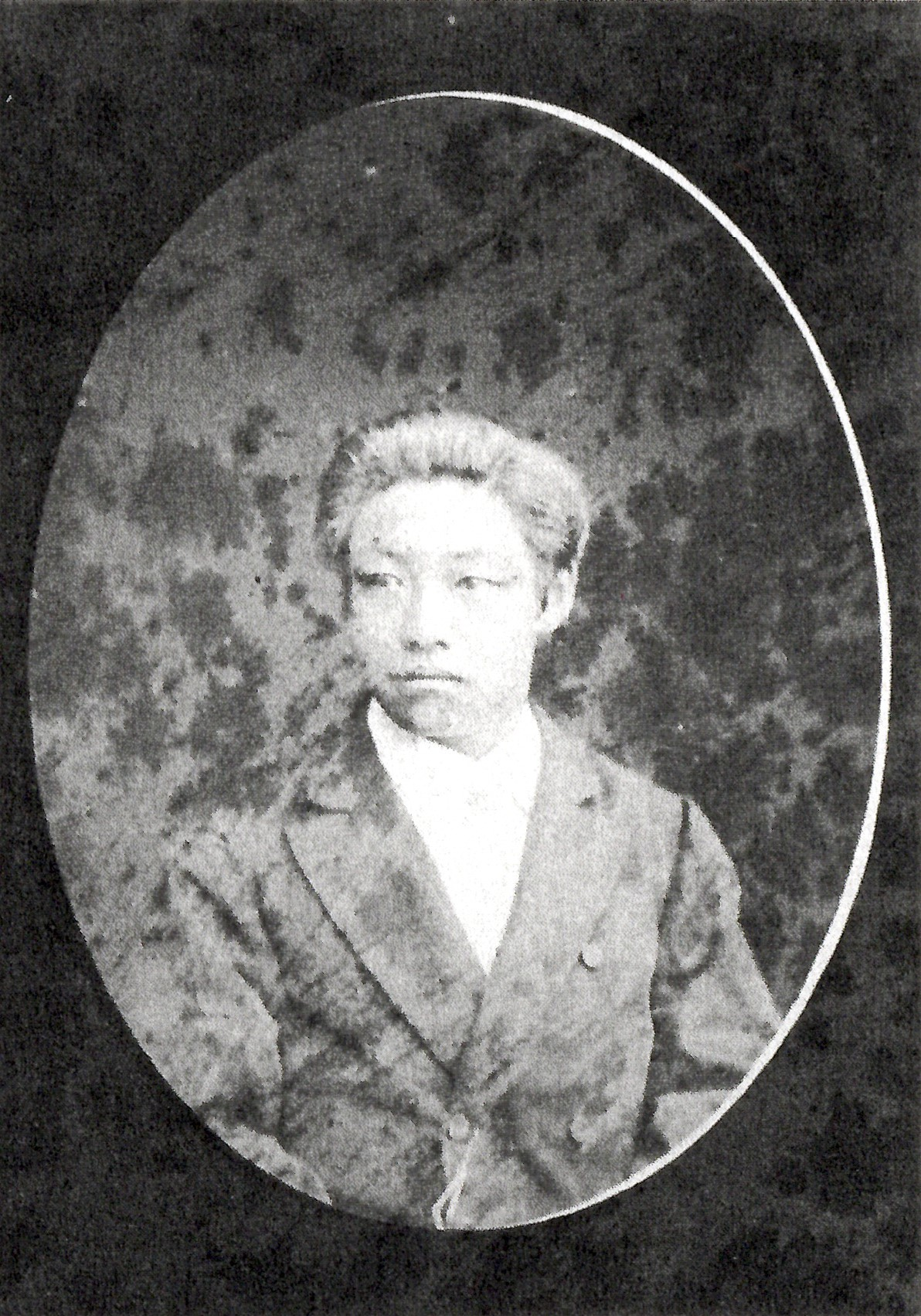 松平頼温の肖像写真。